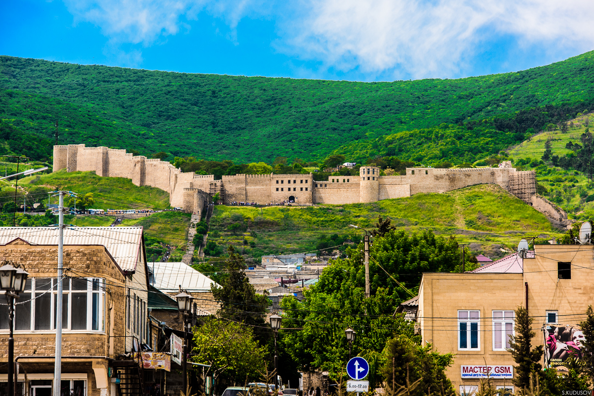 Вид на крепость Нарын-Кала с центральной площади города Денрбент